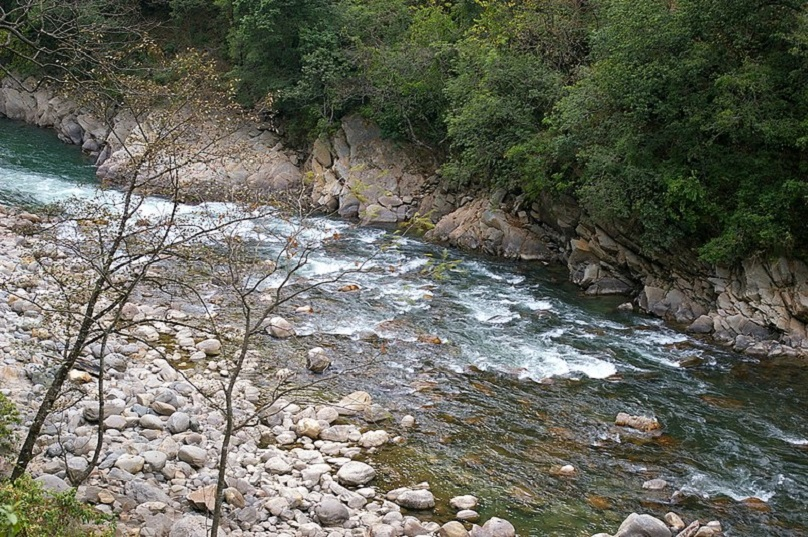 नेपाली: Mandakini Nadi Gadwal Kumau